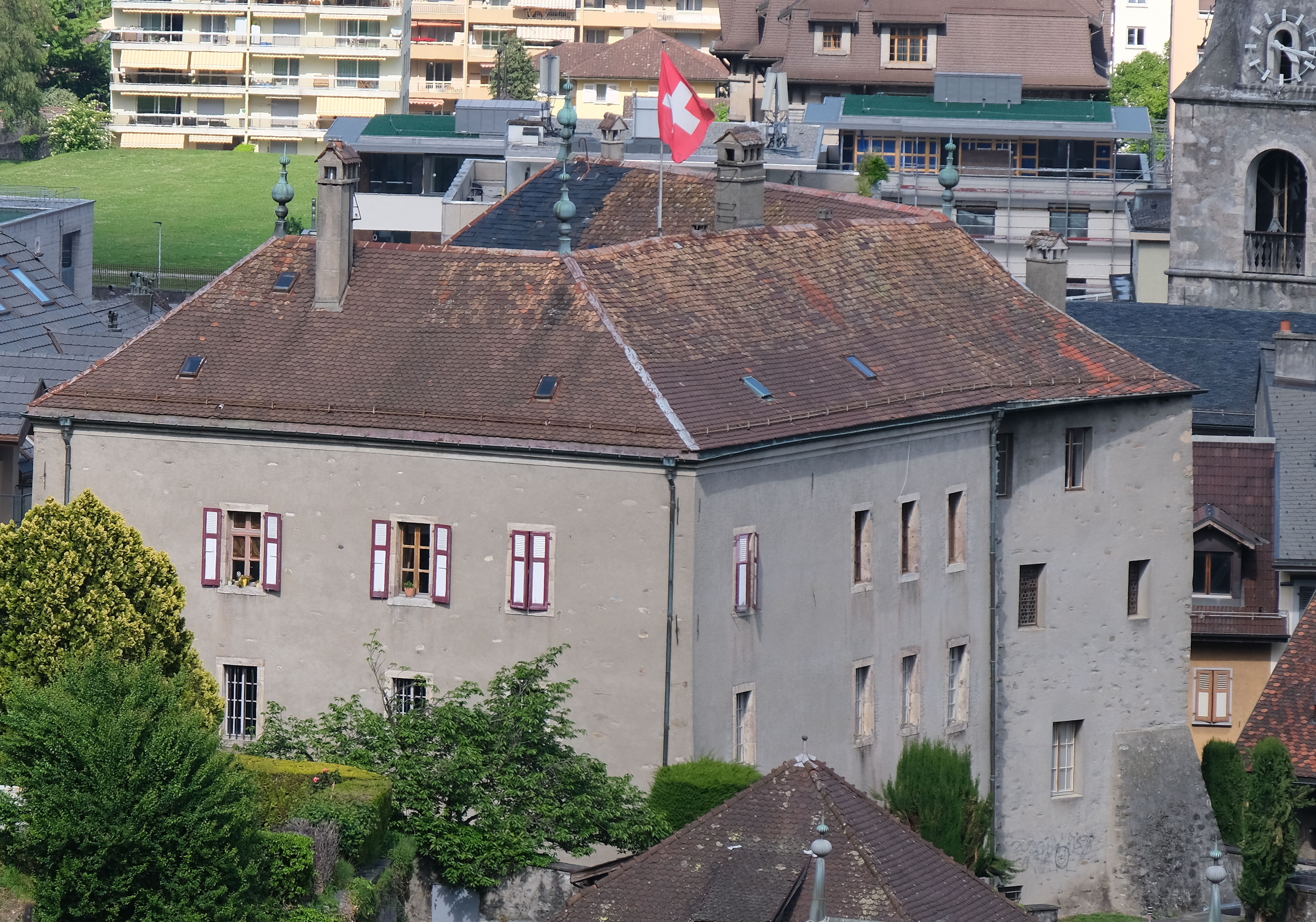 Le château de Monthey en 2020.